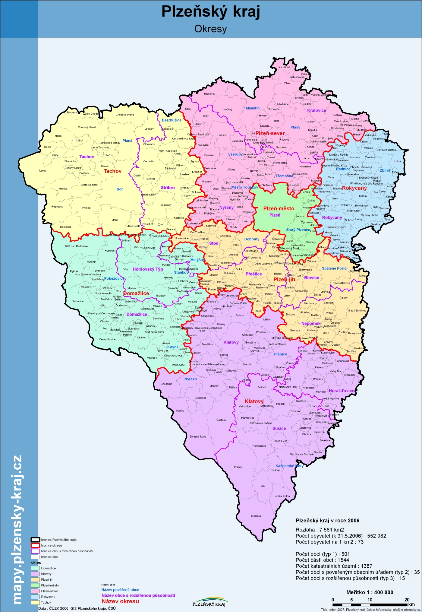 Mapa rozdělení obcí a okresů Plzeňského kraje.